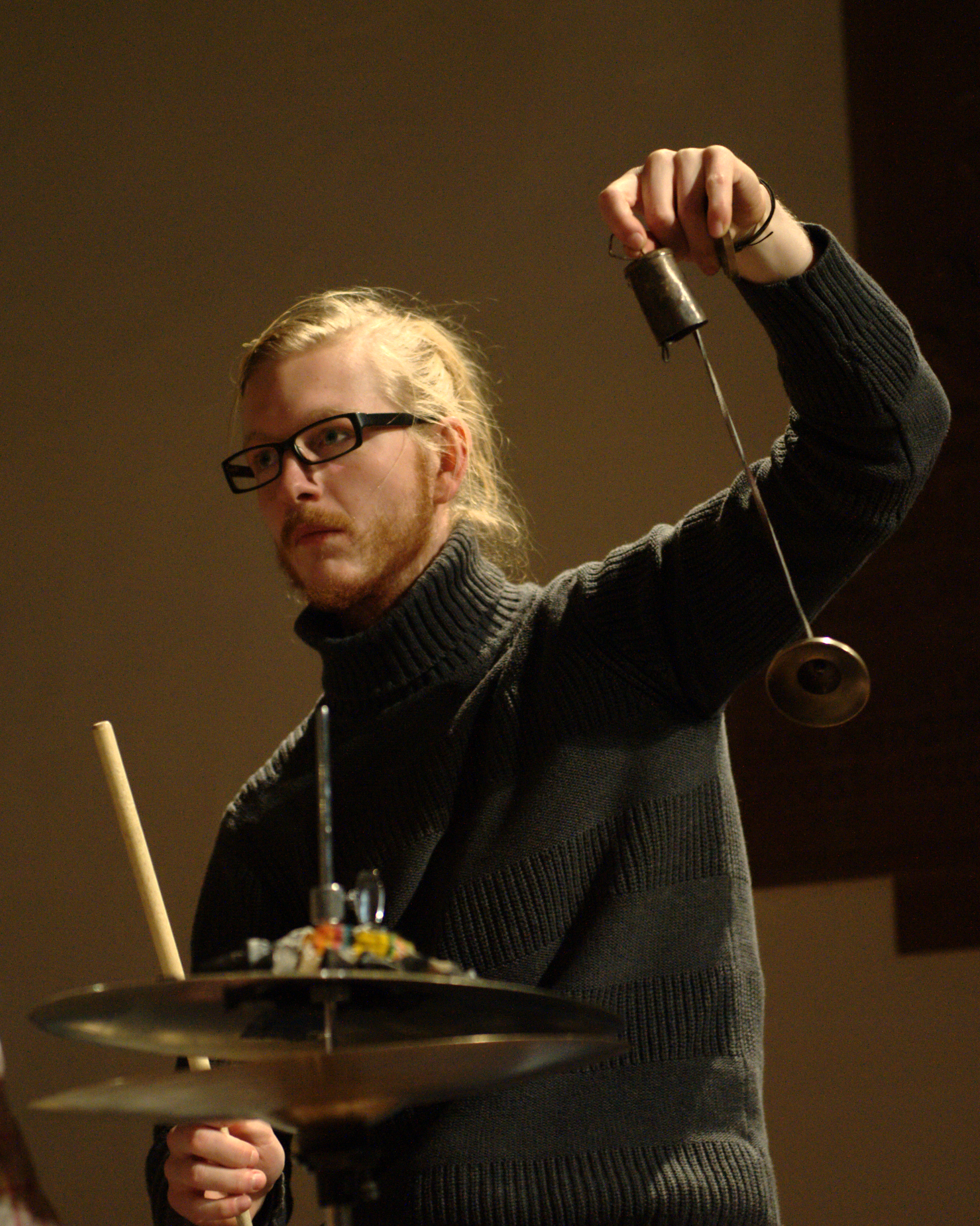 Tilo Weber beim Konzert mit der Kati Briens Dream Band am 31. Januar 2014 in der Stadtkirche Darmstadt